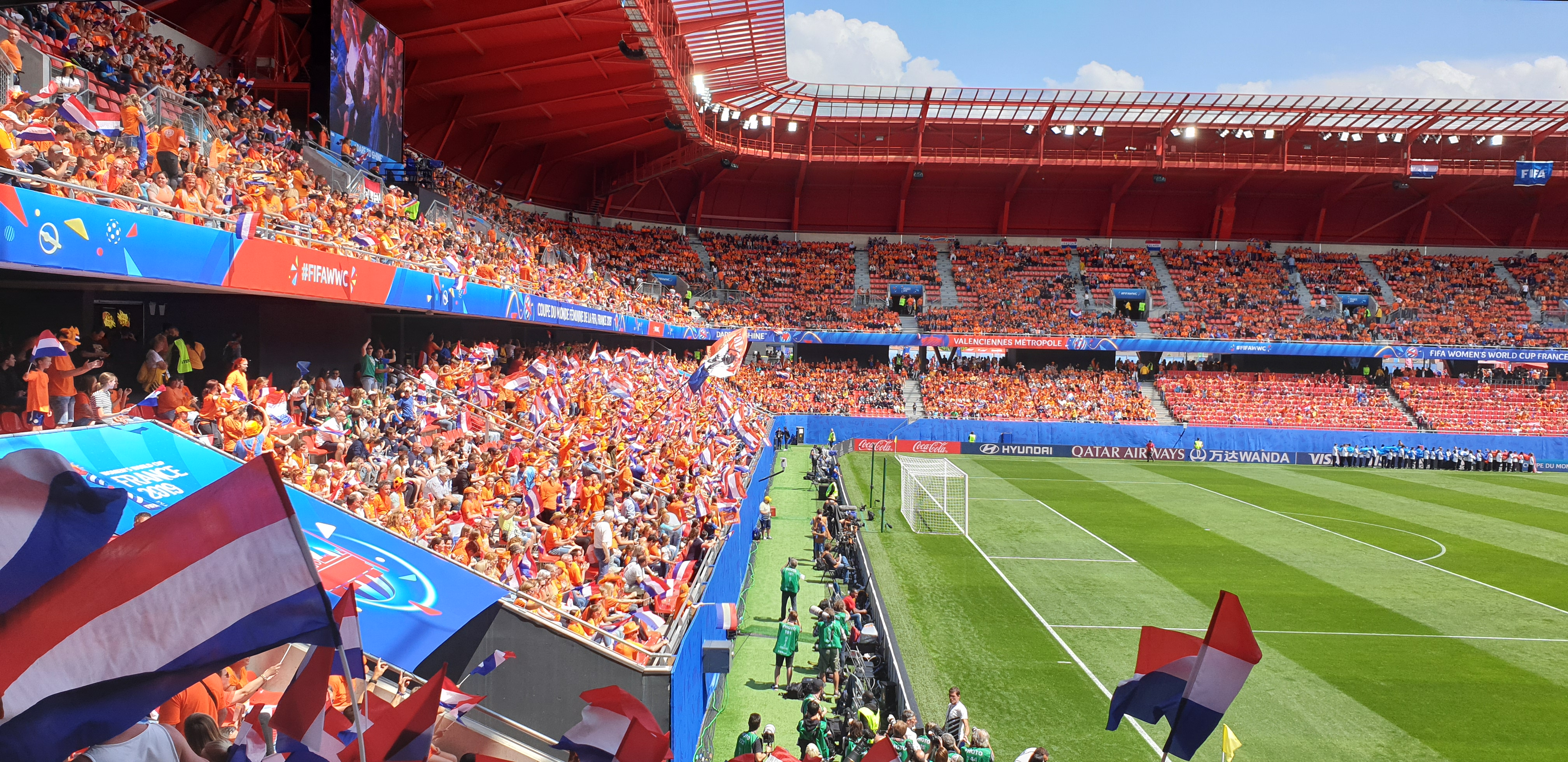 Photo des tribunes du stade du Hainaut de Valenciennes lors du match Pays-Bas Cameroun de la Coupe du monde de football féminin le 15 juin 2019